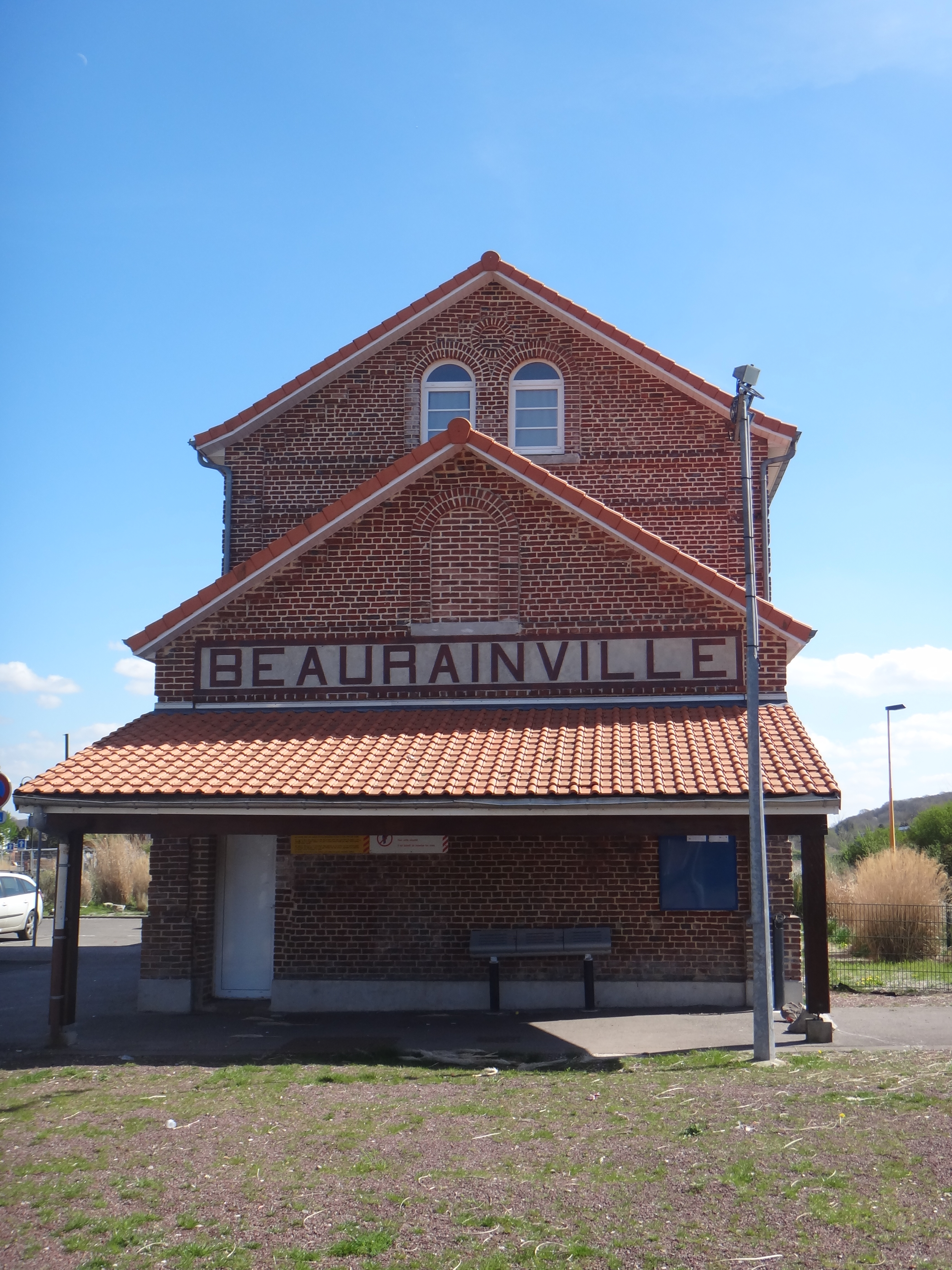 Gare de Beaurainville, Pas-de-Calais, France, en 2014